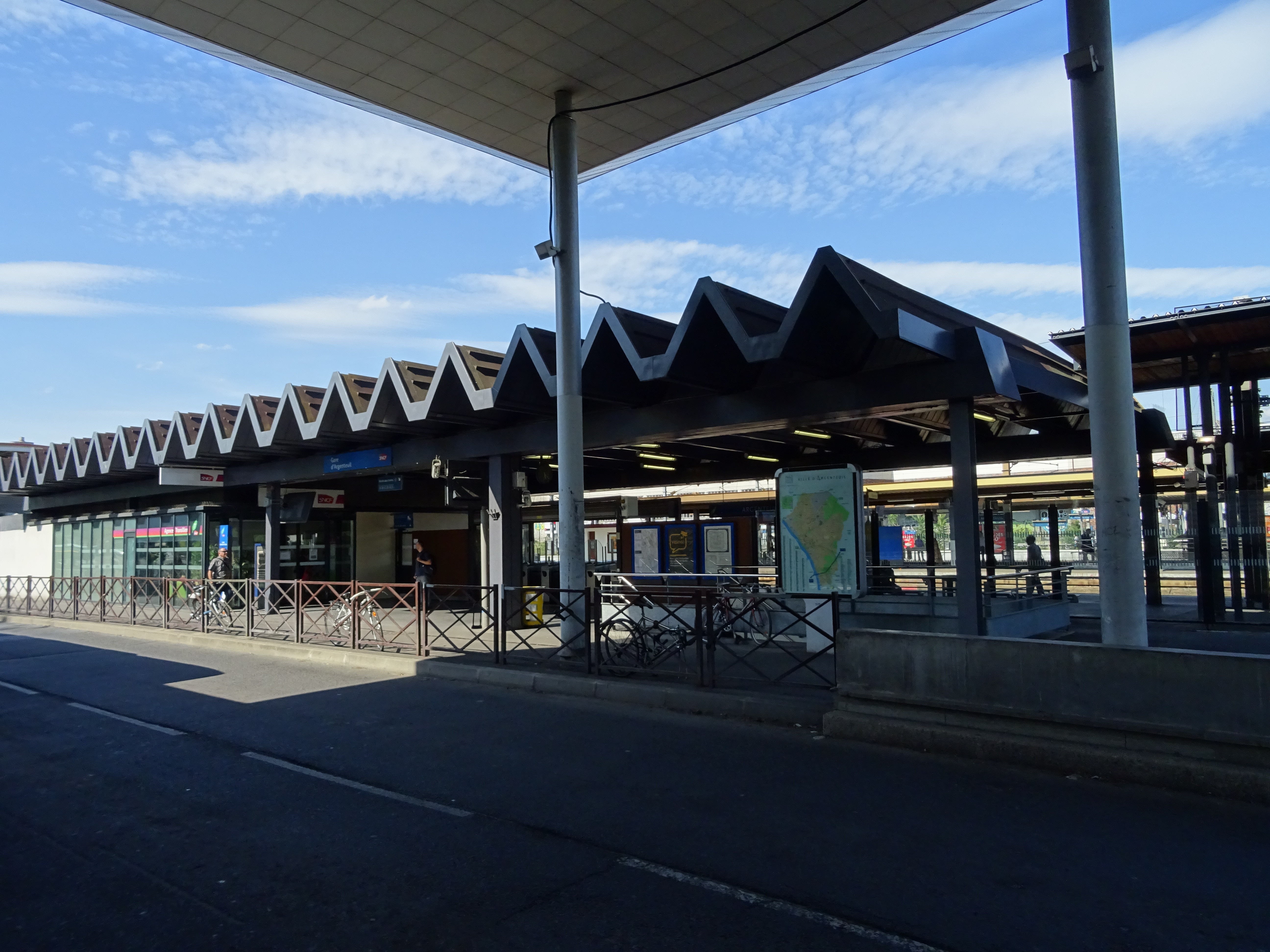 Vue de trois quarts du bâtiment voyageurs de la gare d'Argenteuil